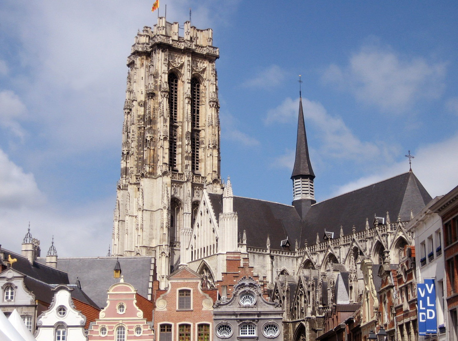 Mechelen Kathedral Source